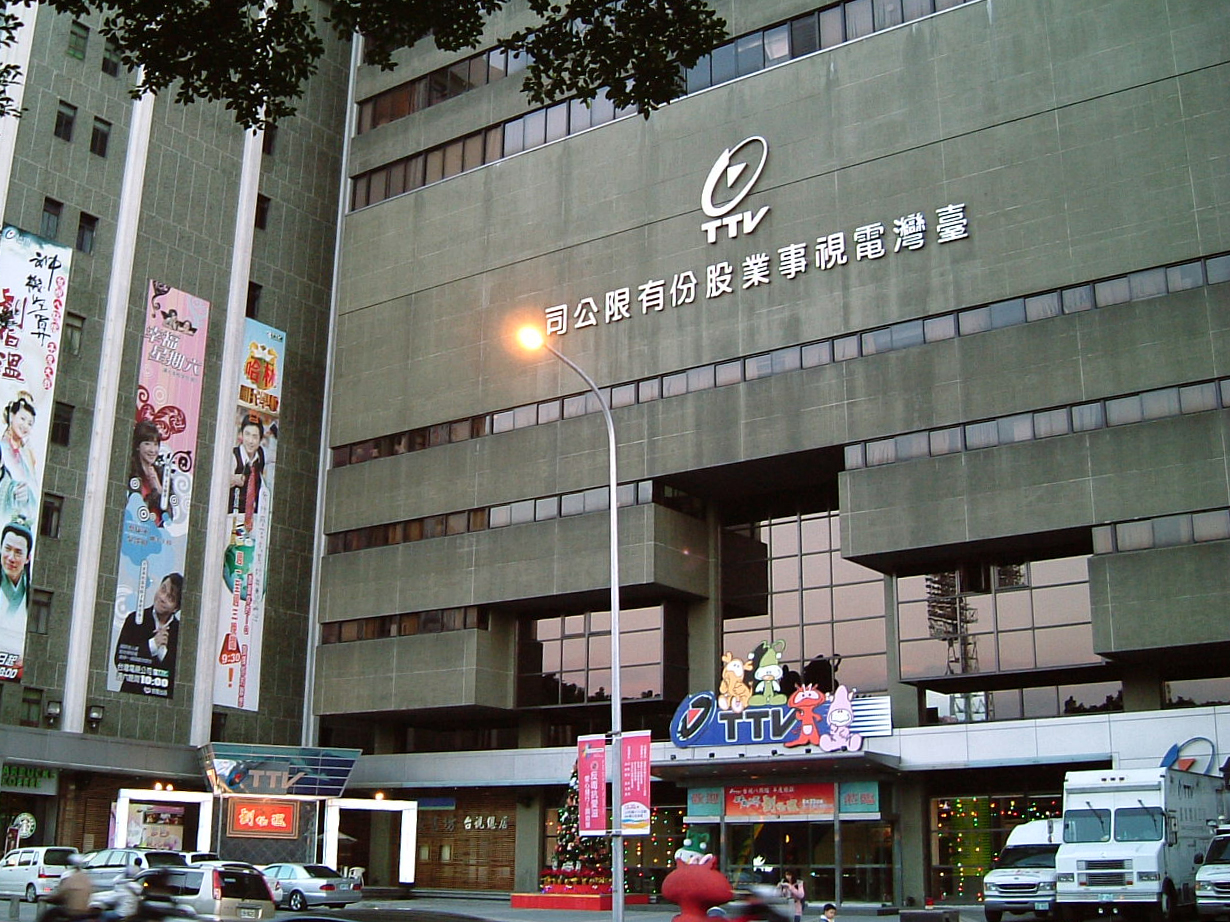 中文（台灣）: 台視東翼大樓與中央大樓。